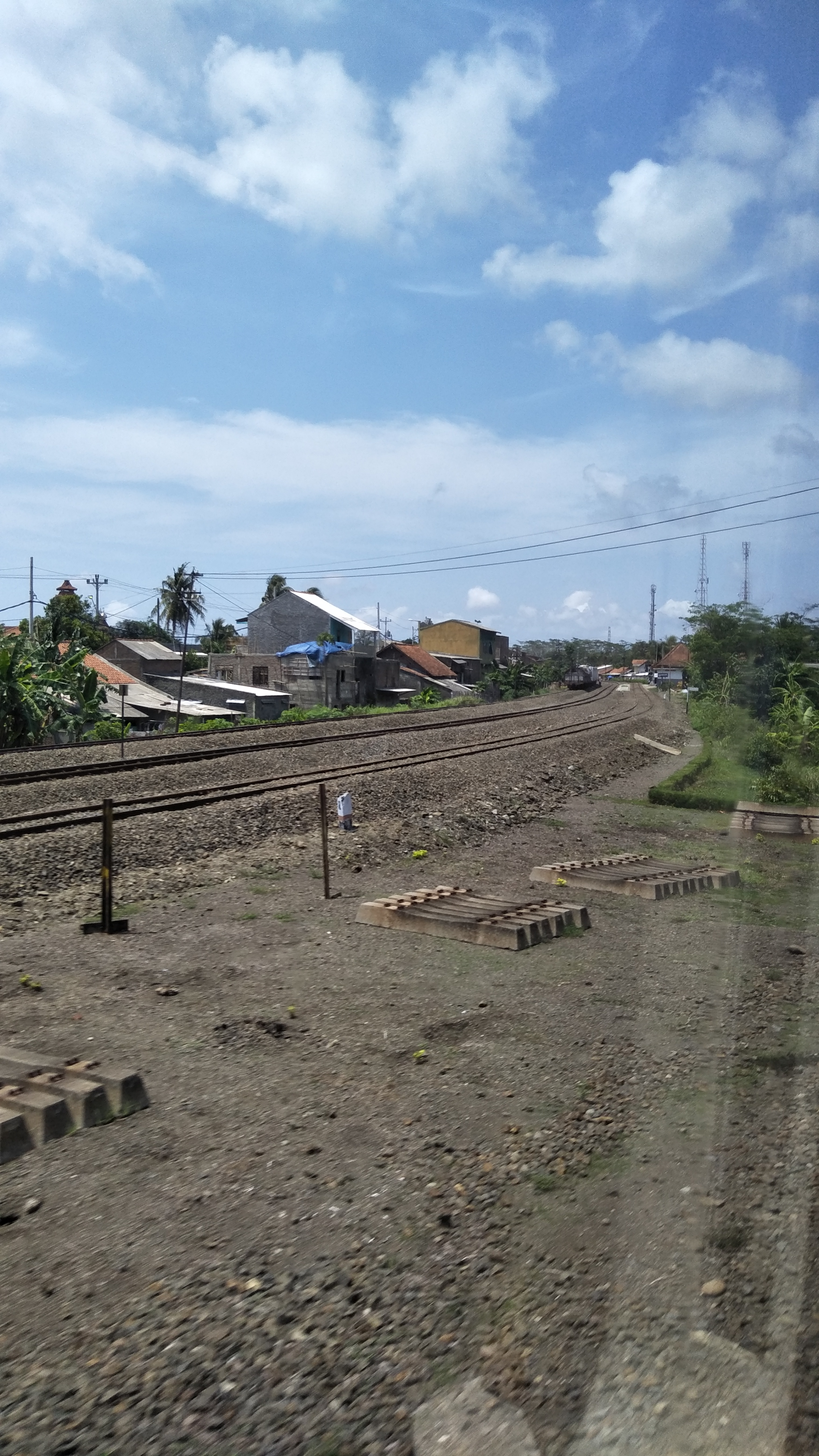 Percabangan jalur menuju Cilacap